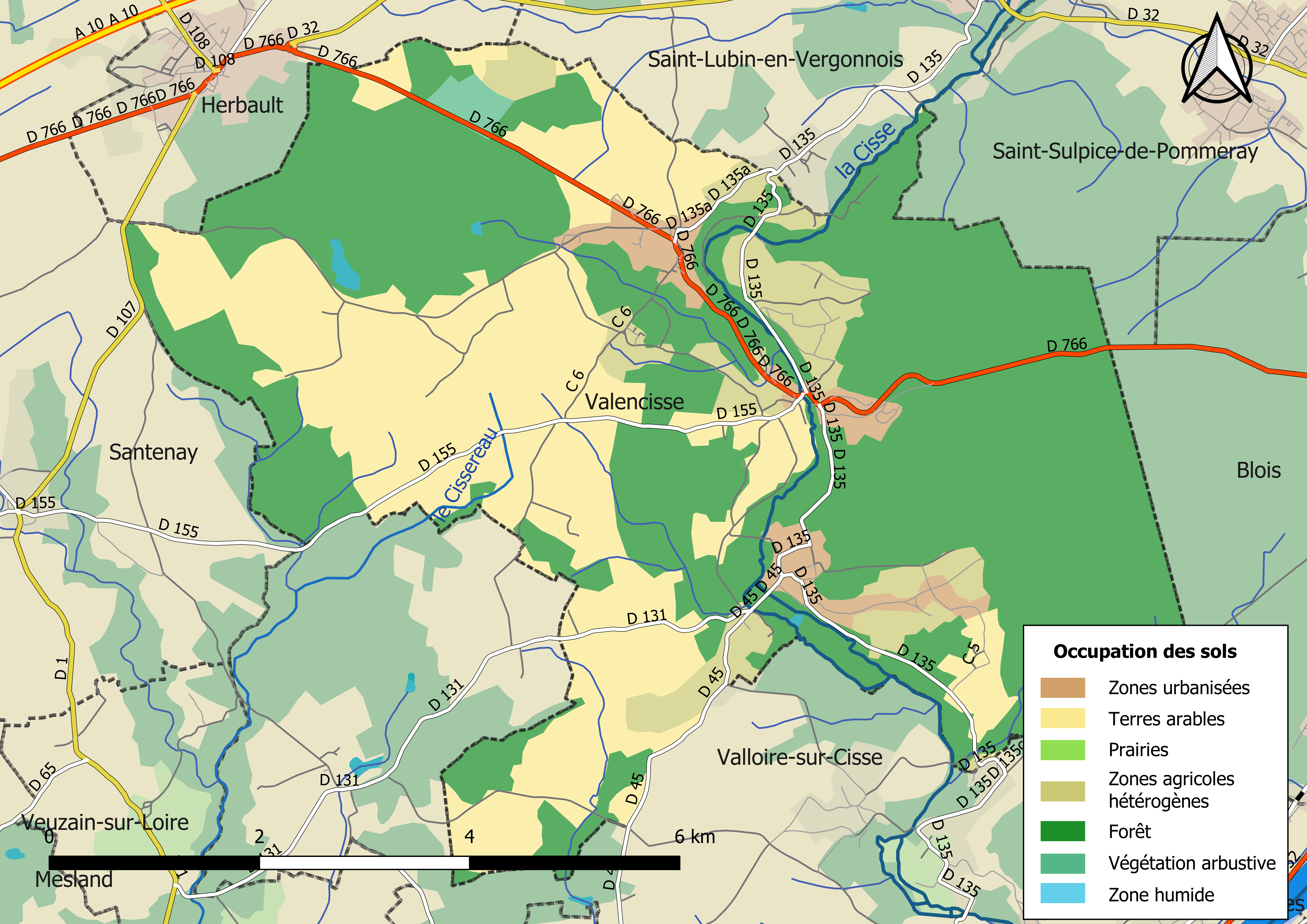 Carte des infrastructures et de l’occupation des sols en 2018 de la commune de Valencisse (France).